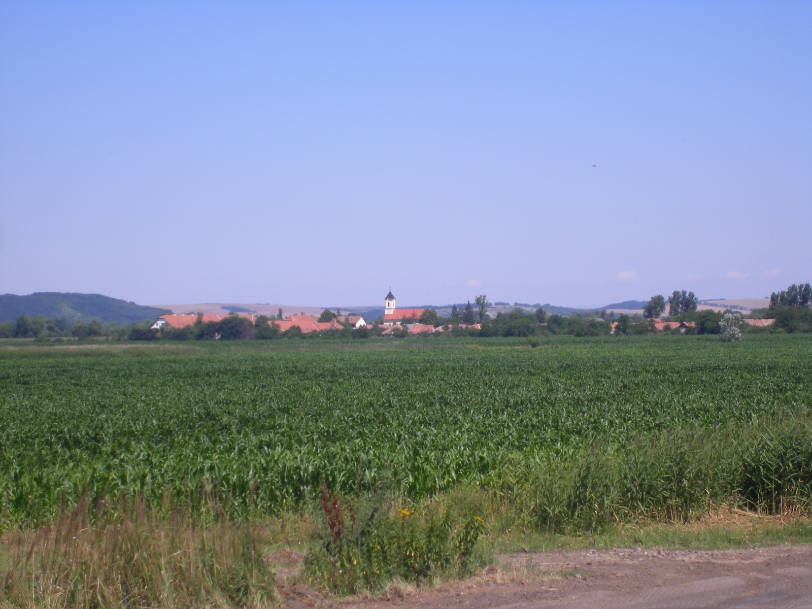 Ipolytölgyes - a falu látképe dél felől